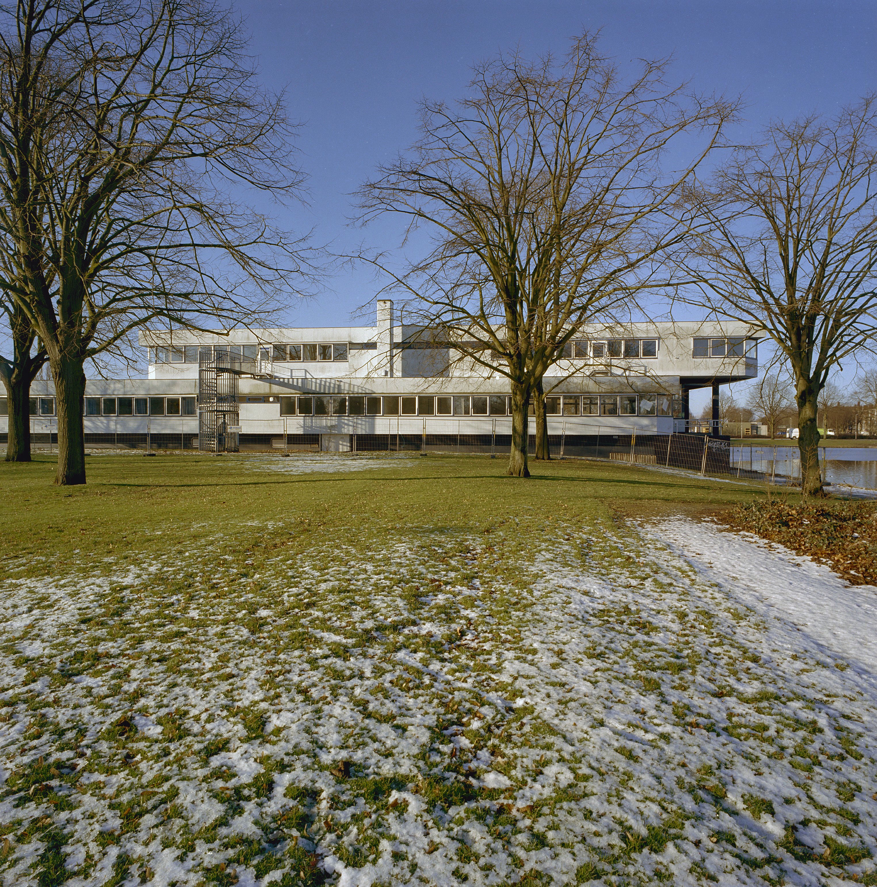 Wavingebouw: Overzicht oostzijde, gebouw gesloopt in april 2003